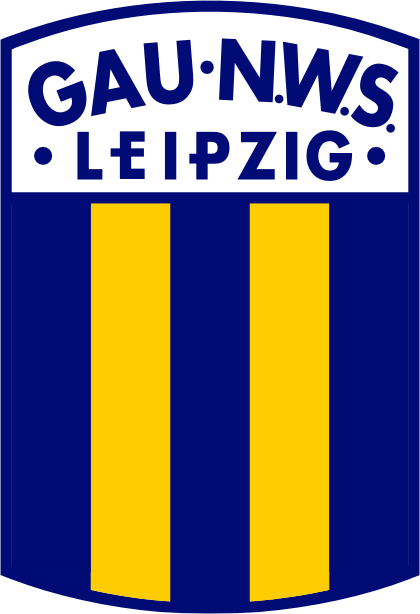 Logo der Gauliga Nordwestsachsen.